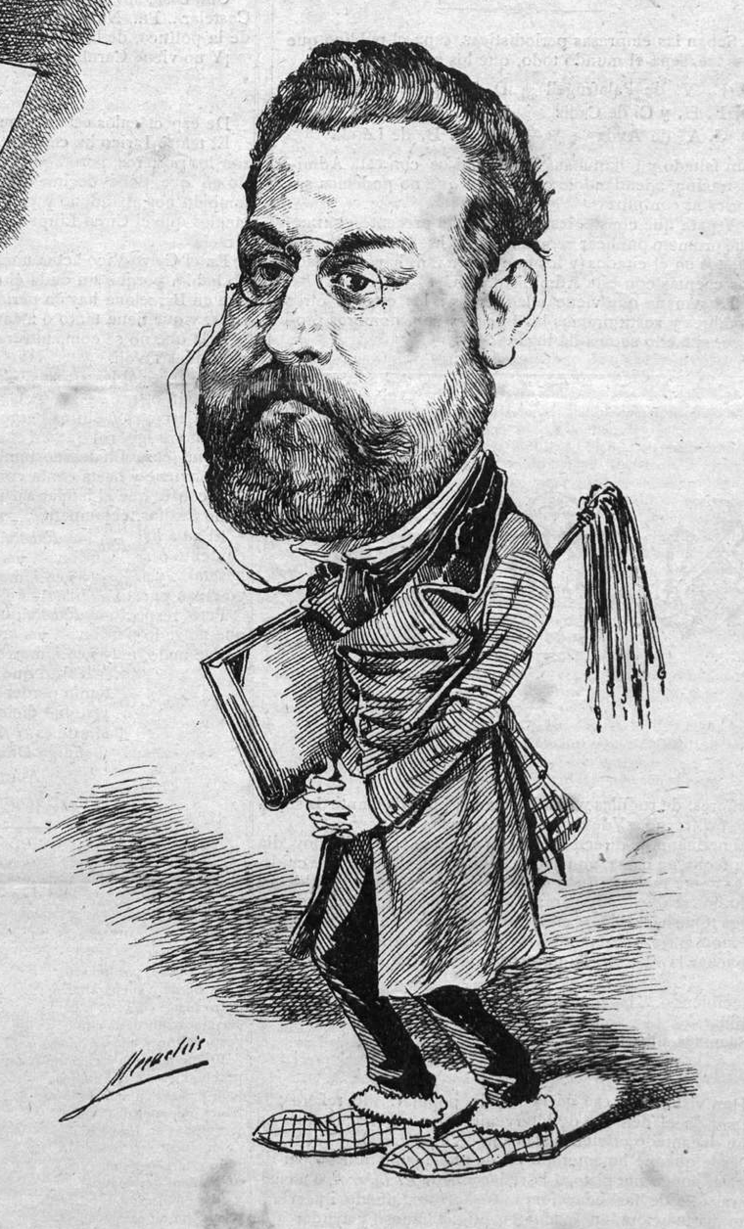 José Feliu y Codina.